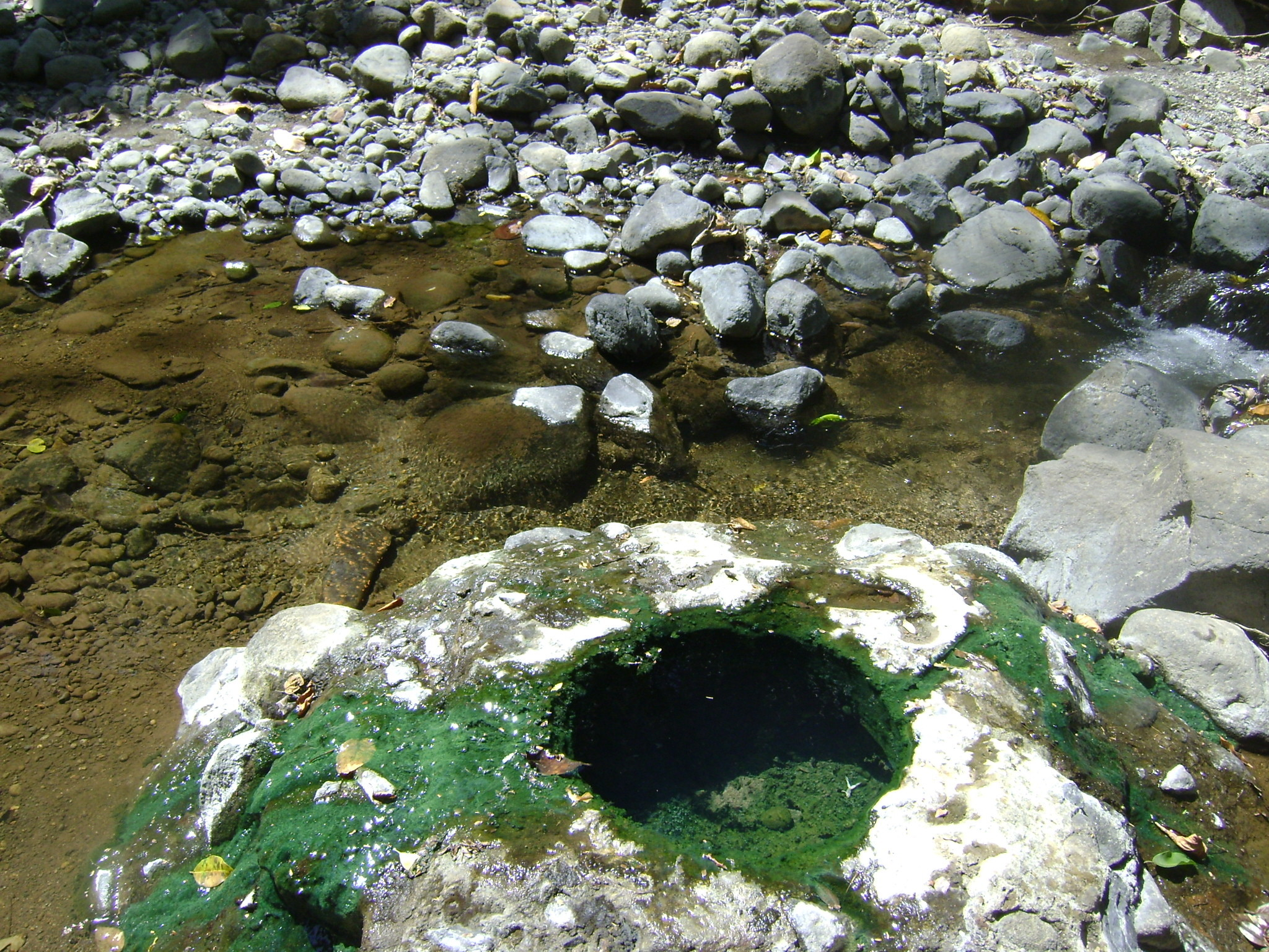 Pozo termal en Calobre, Veraguas